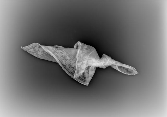 Věra Stuchelová´s photographs